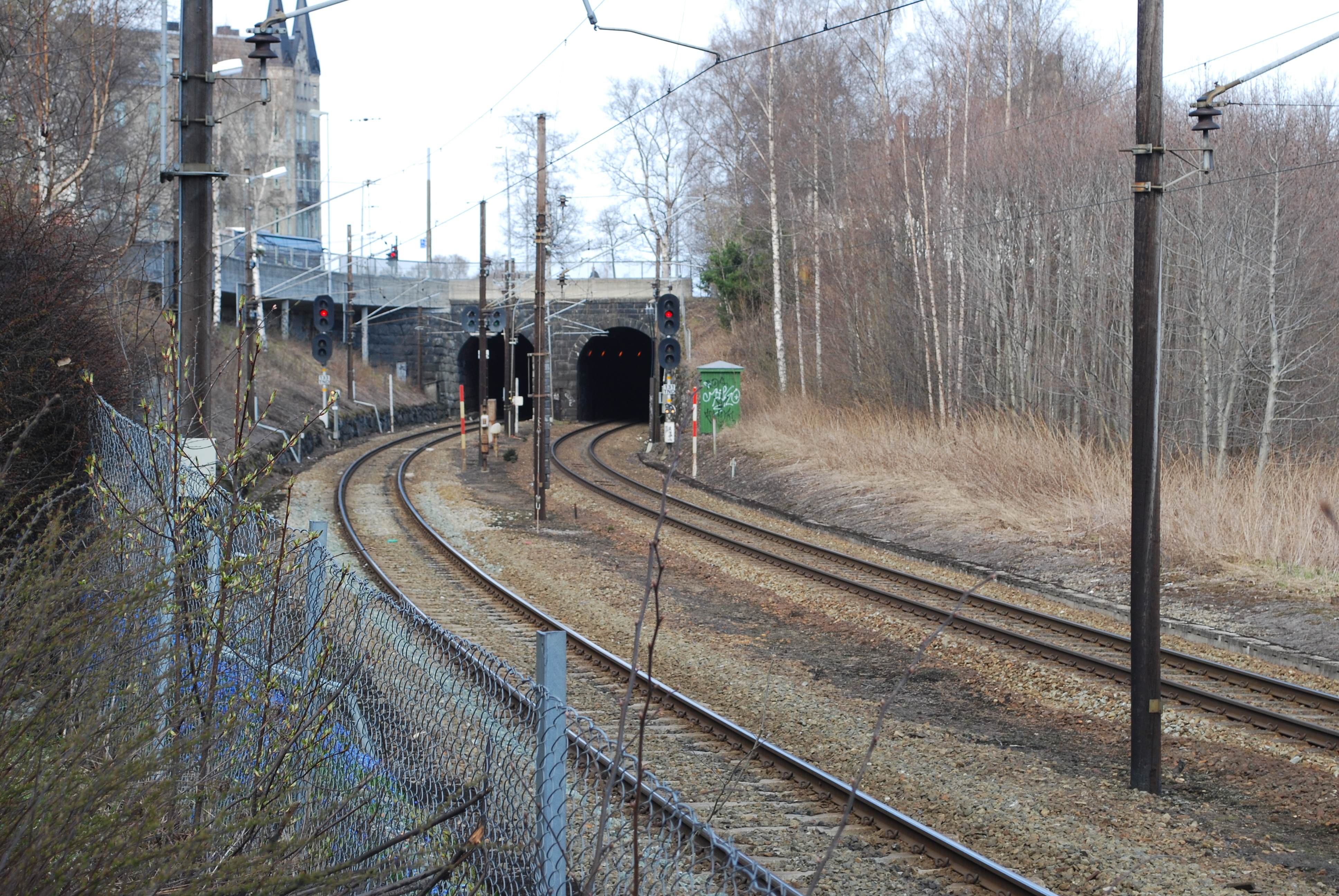 Åstedet for Nidareidulykken den 19. september 1921 ved Ila (Nidareid) i Trondheim.